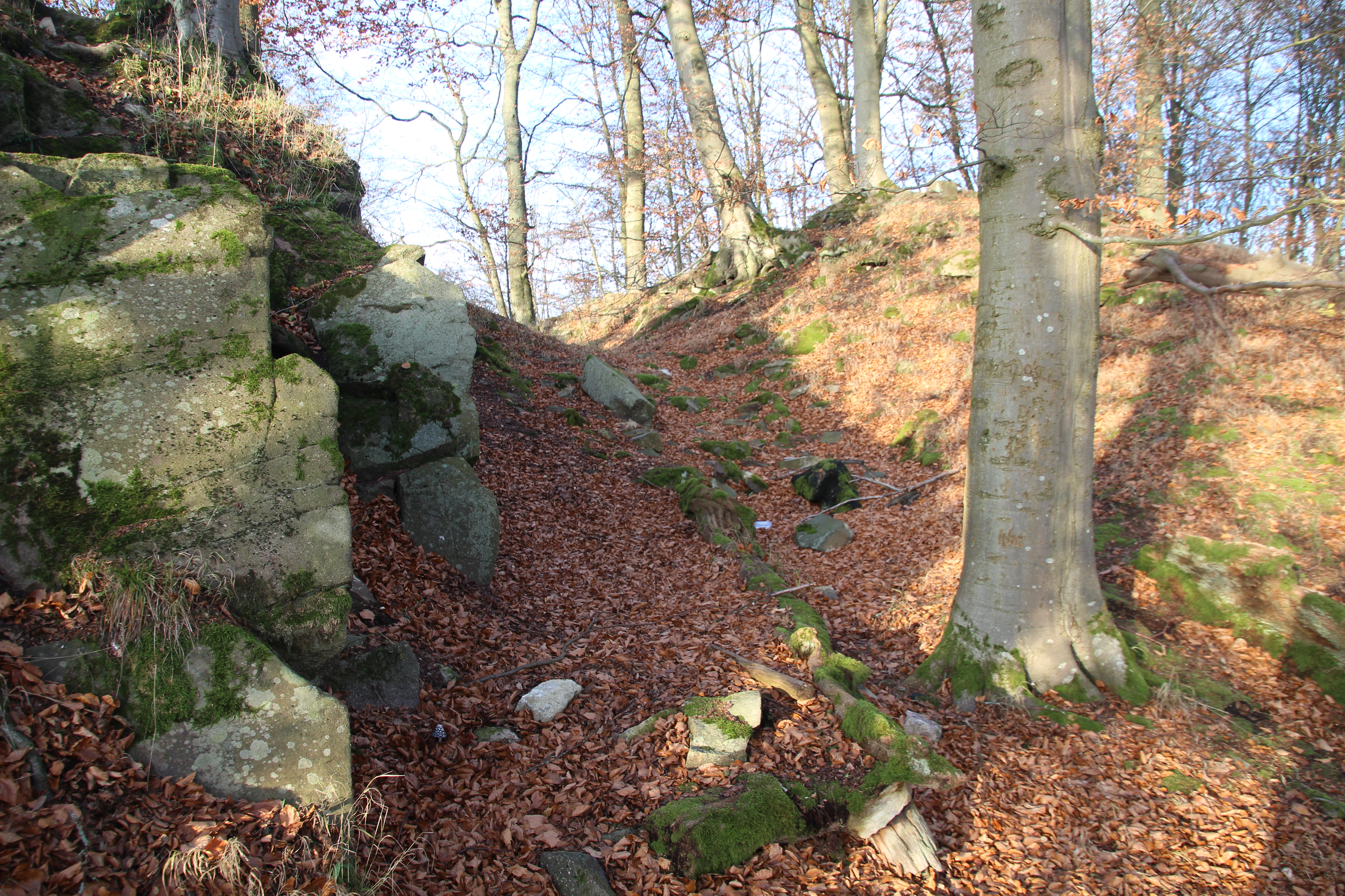 Siehe Bild und Dateiname